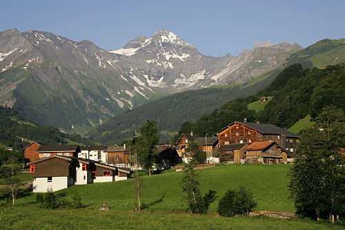 Elm